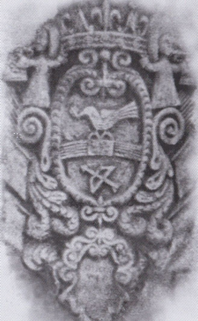 Arthur Verona - Stema familiei Lucovich